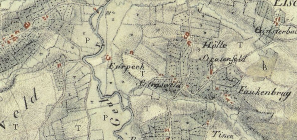 Hurpesch op Tranchotkaart, tegenwoordig gemeente Gulpen-Wittem, Limburg, Nederland